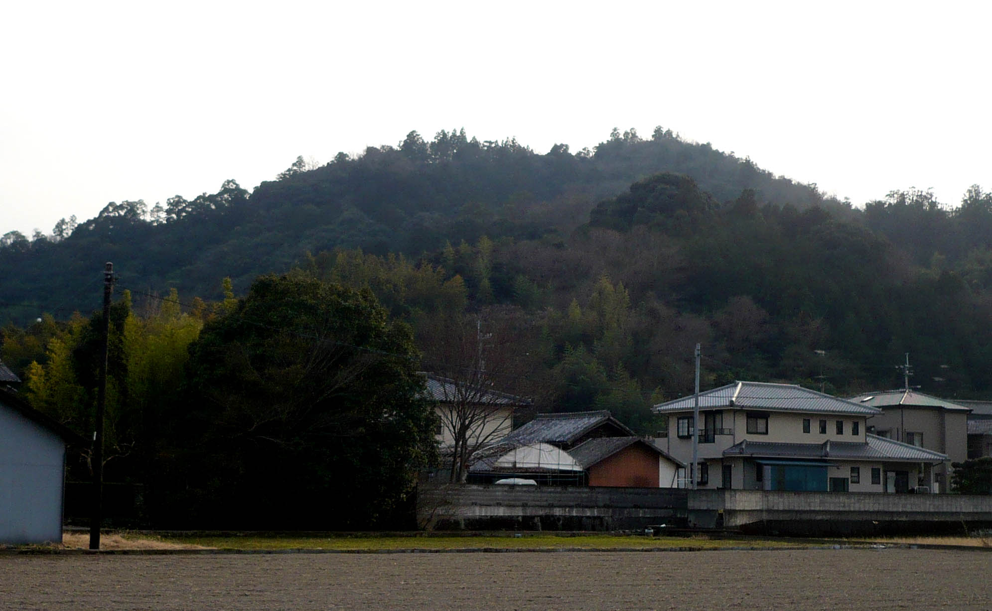 一宮城が建つ城山